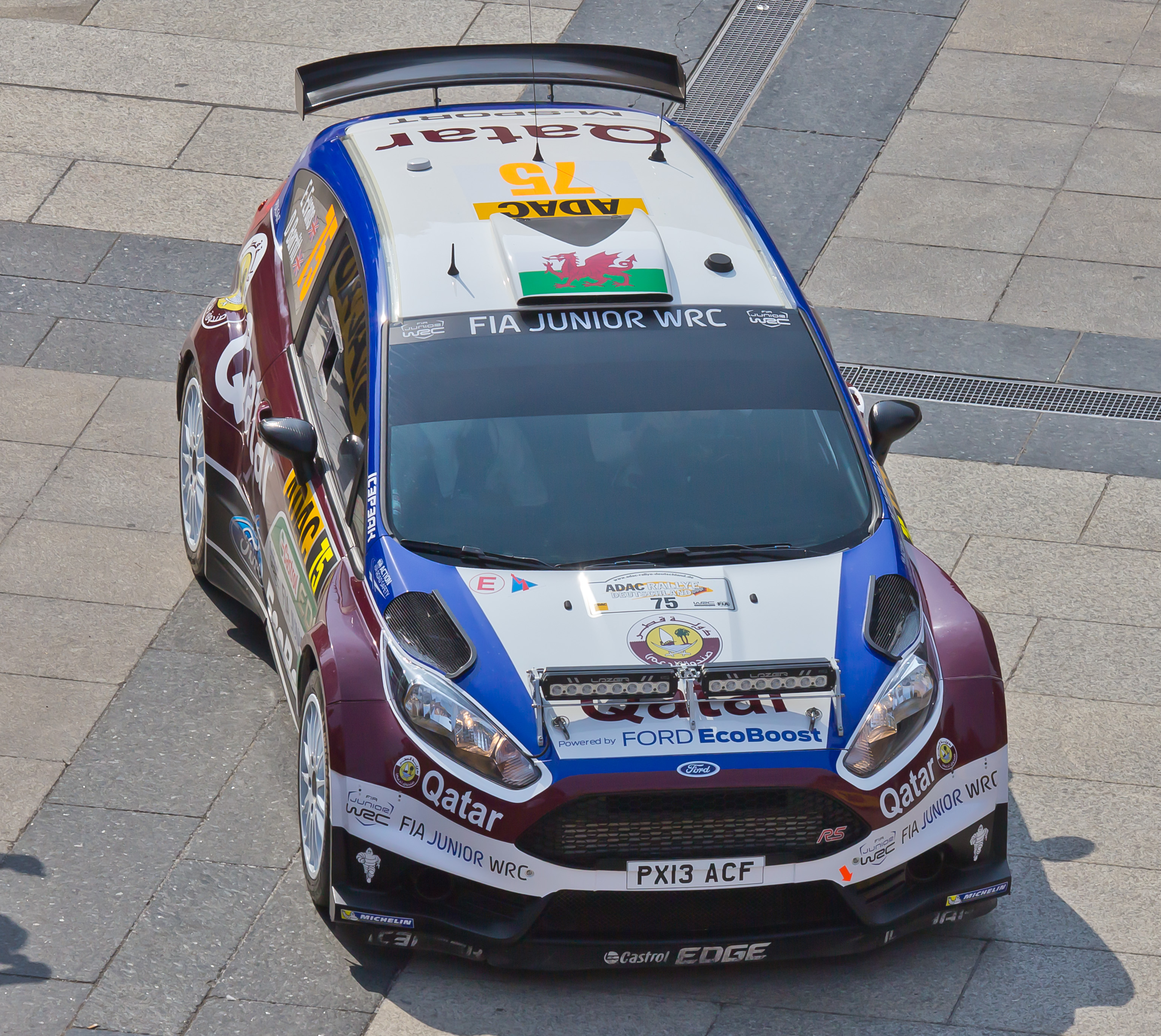 ADAC Rallye Deutschland 2013 - Fahrerpräsentation auf dem Roncalliplatz: Qatar M-Sport World Rally Team mit dem Fahrer Elfyn Evans und und Co-Fahrer Daniel Barritt im Ford Fiesta R5